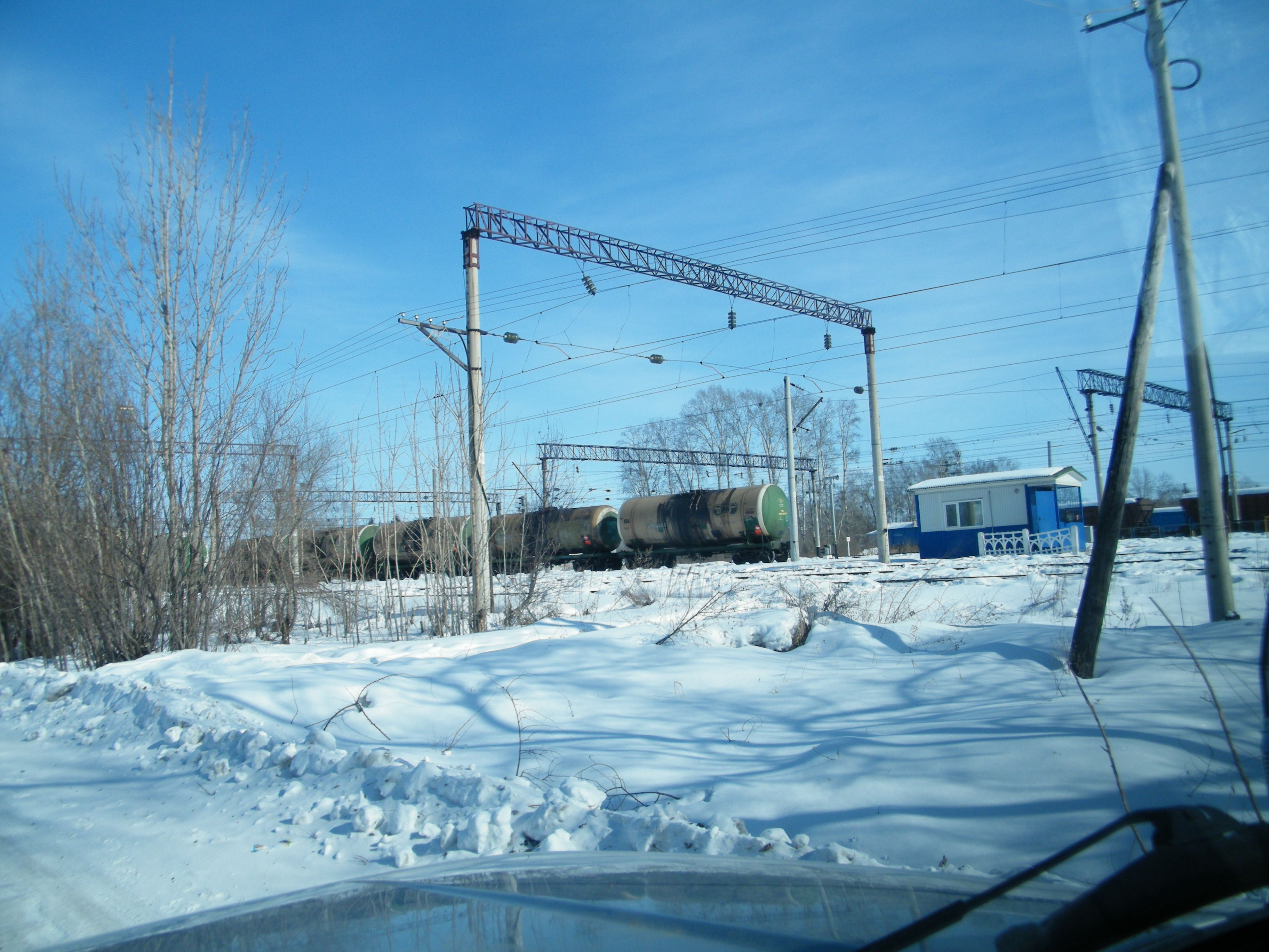 Волочаевка-2 ЕАО